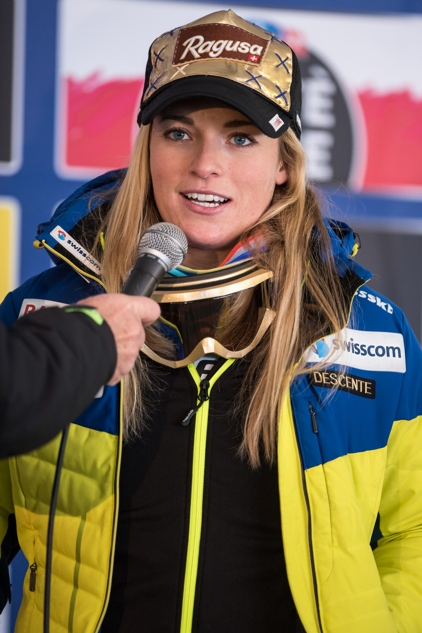 64. Kandahar Rennen,Audi FIS Ski Weltcup Garmisch-Partenkirchen,Damen Super-G,Kandahar,Ladies Super-G,Lara Gut